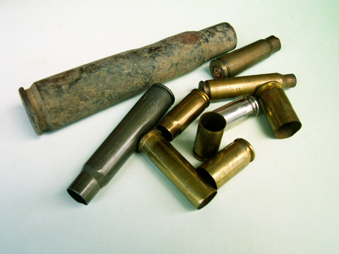 Tulci različnih nabojev. Puškovni, revolverski in pištolski. Lepo so vidne razlike med valjastimi, stekleničastimi in konusnimi tulci.